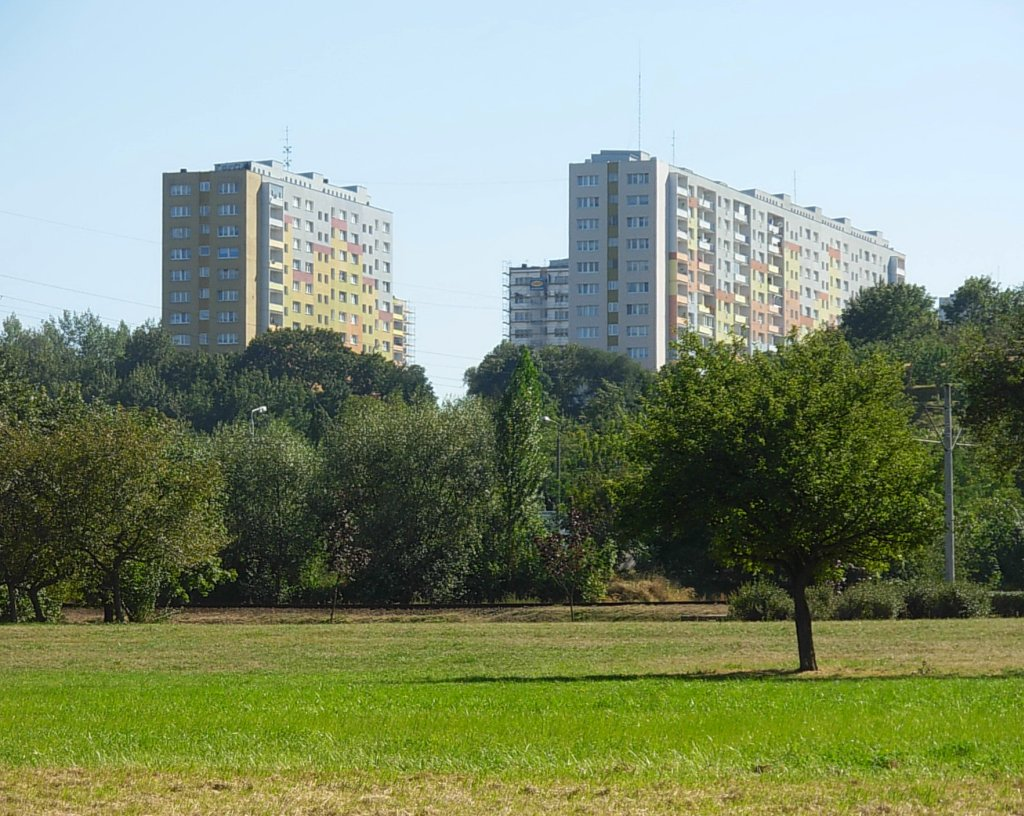 Wieżowce Wyżyn z parku Centralnego